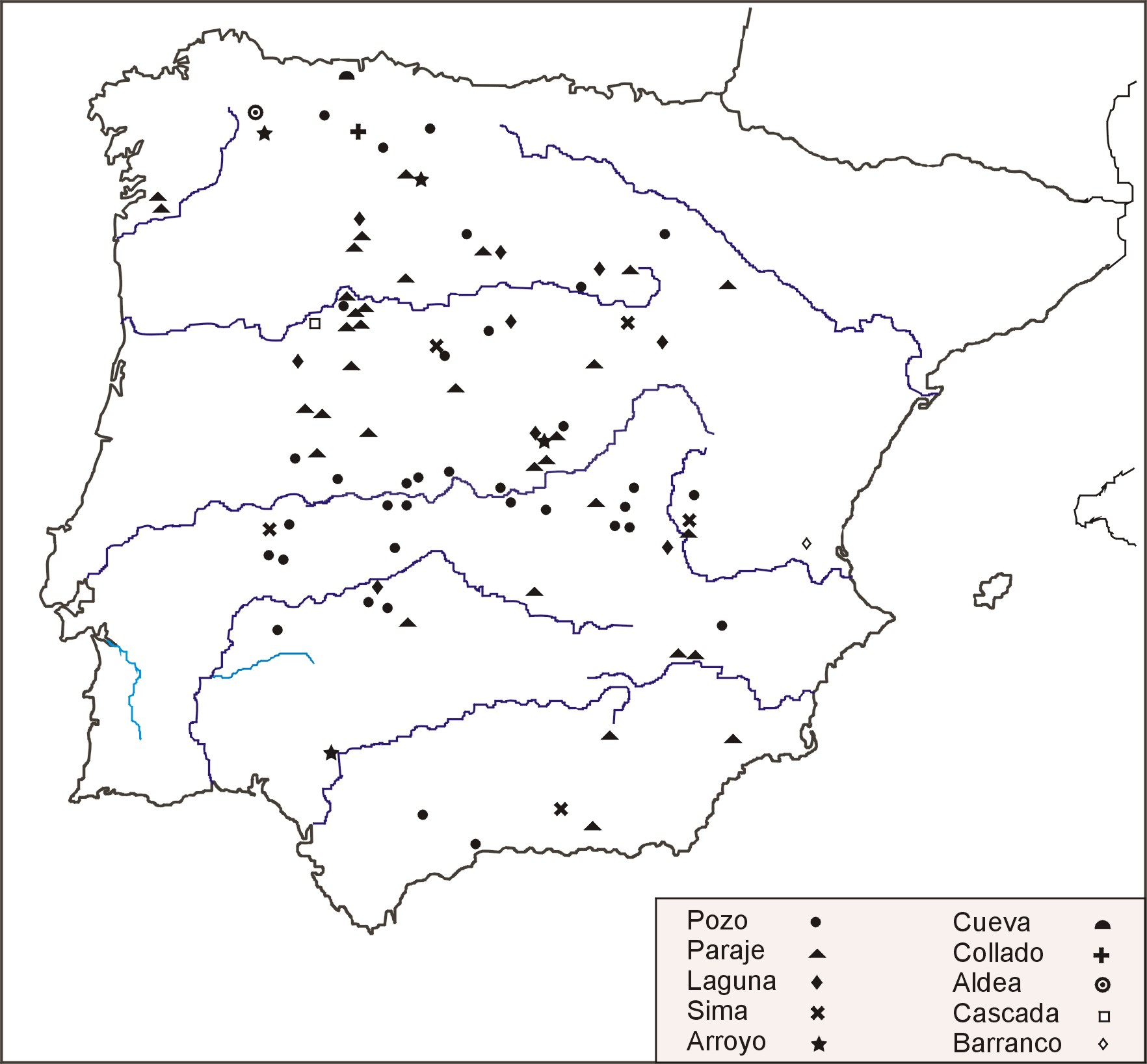 Mapa localización pozos airones